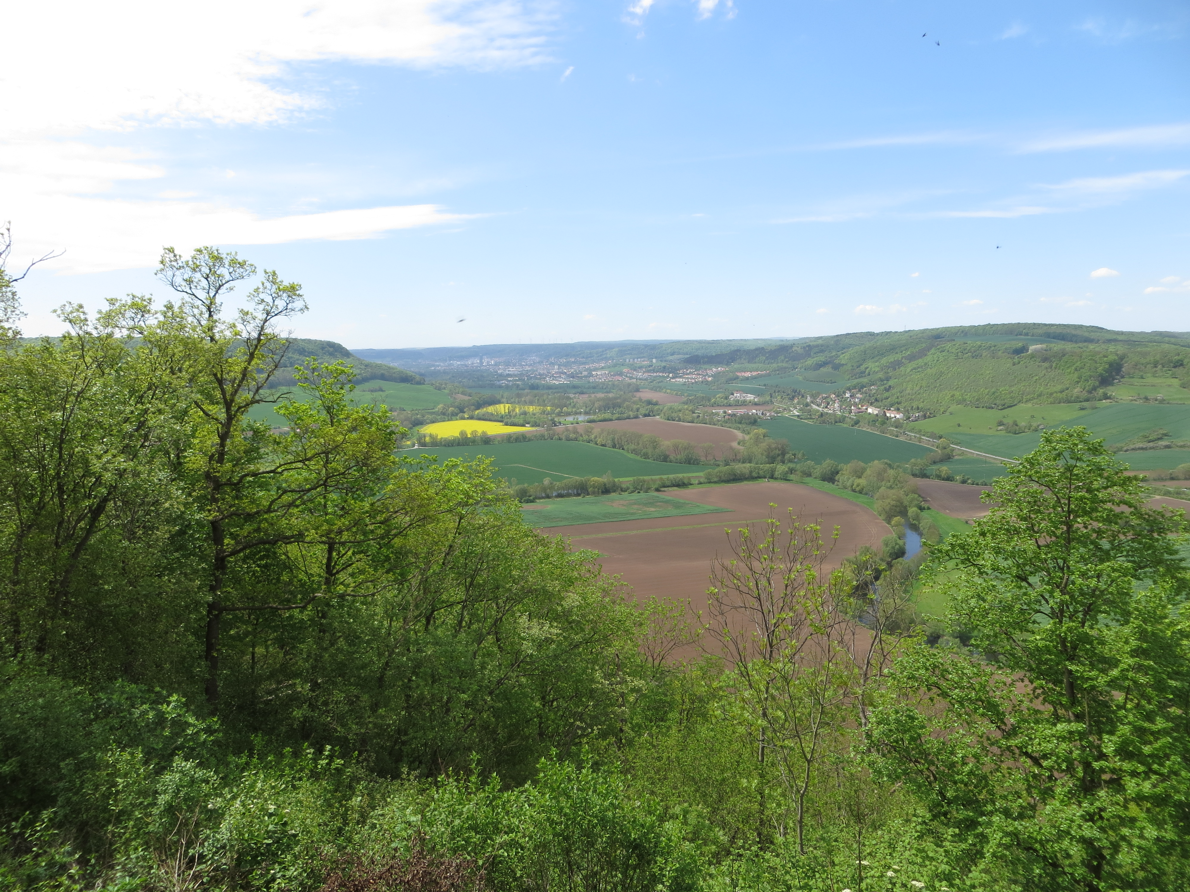 Blick vom Aussichtpunkt "Hohe Lehde" nach Jena; LSG: Mittleres Saaletal